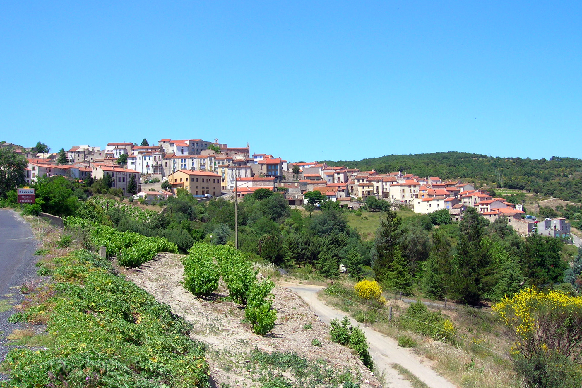 Vue générale de la commune de Bélesta dans les Pyrénées-Orientales